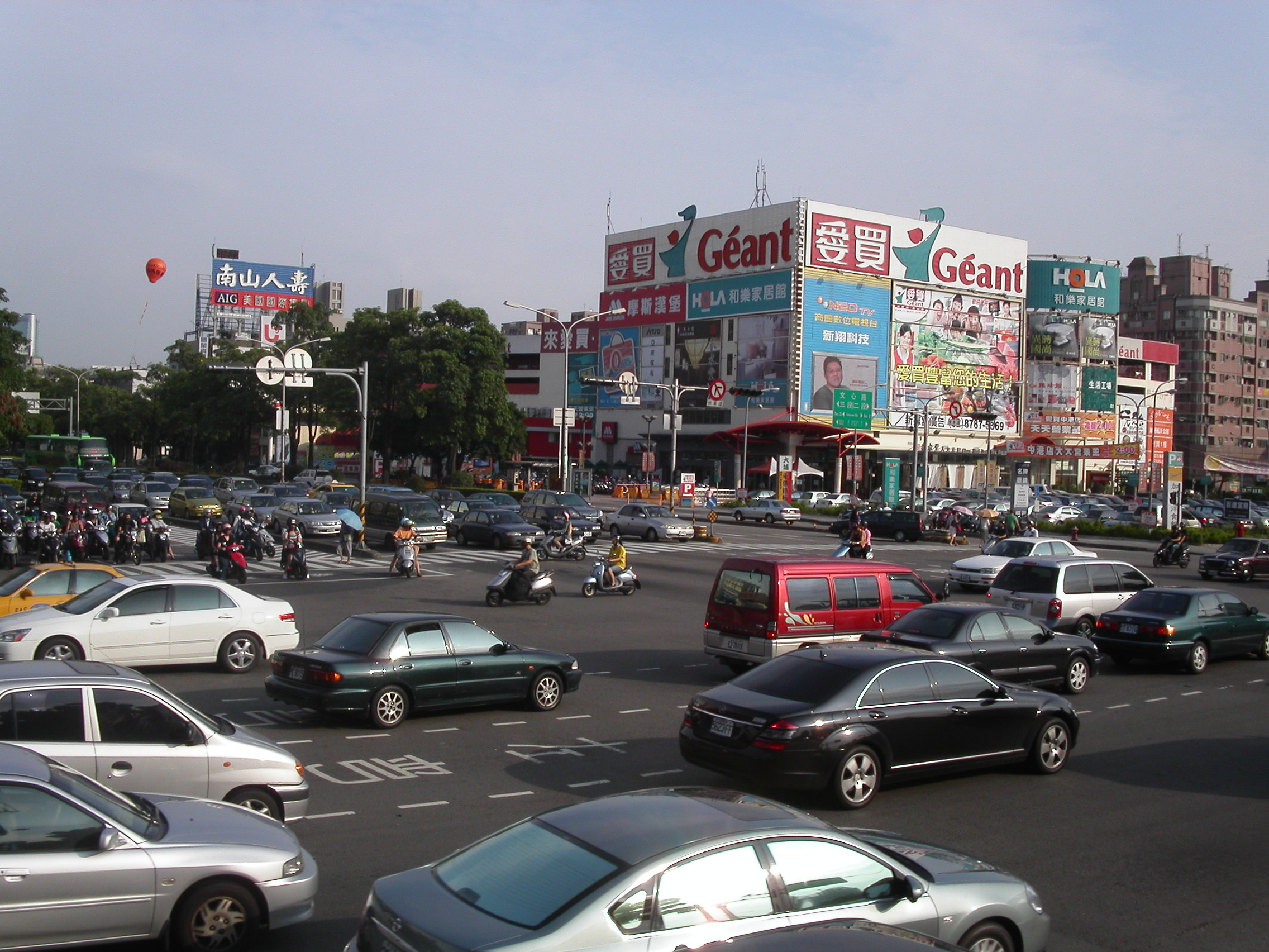 臺中市西屯區文心路二段及臺中港路二段路口。